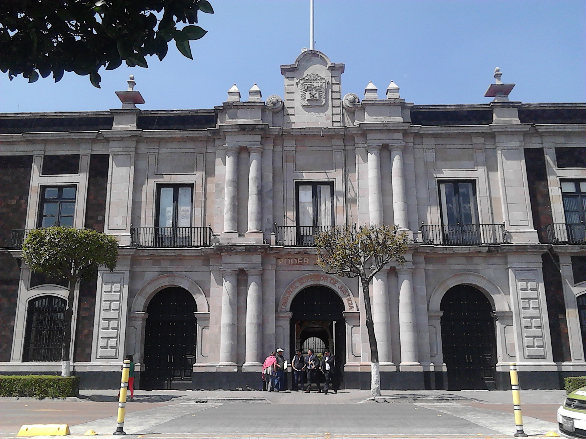 Este edificio es del Tribunal Superior de Justicia, comúnmente conocido como Palacio de Justicia